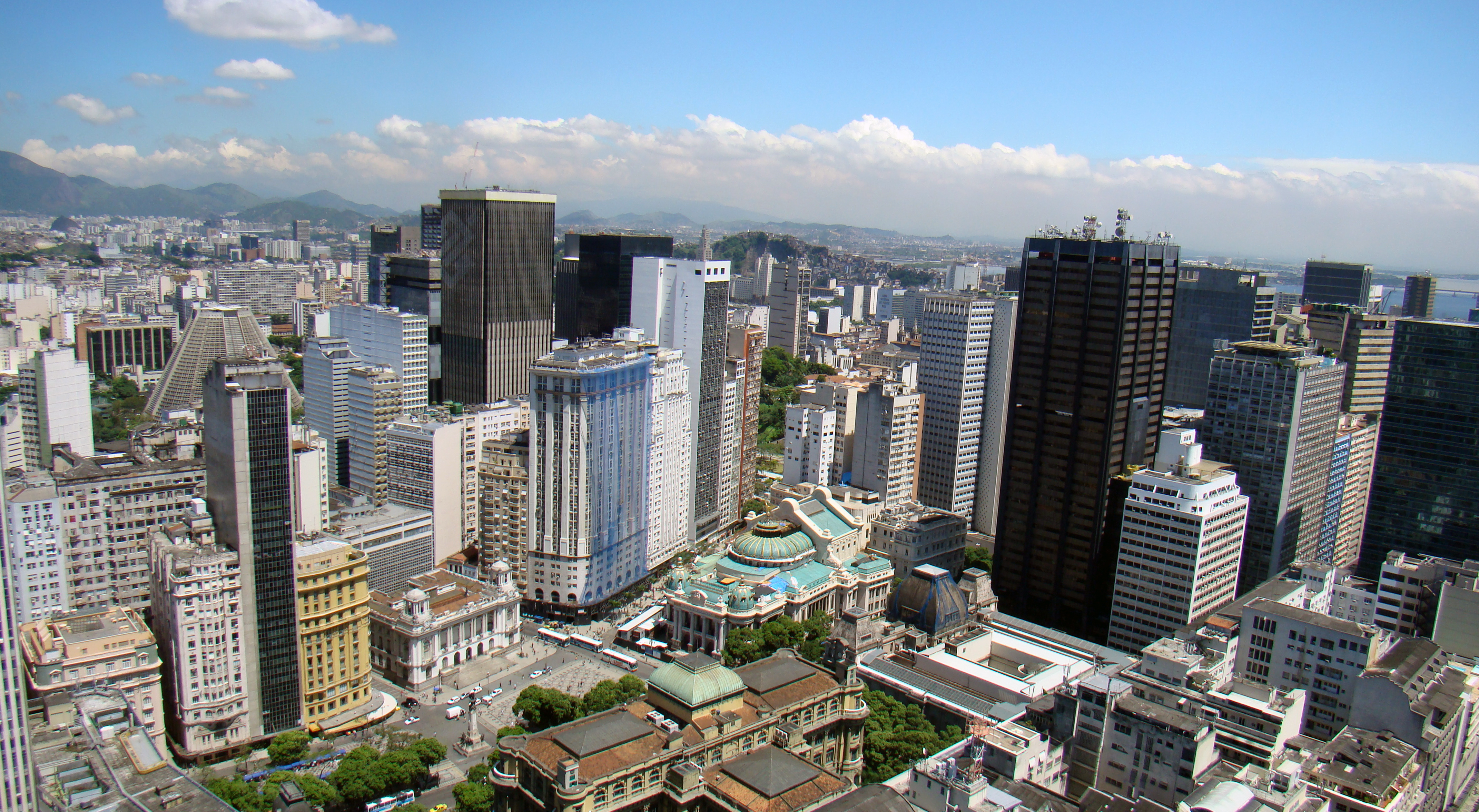 O Centro é um bairro da Região Central da cidade do Rio de Janeiro